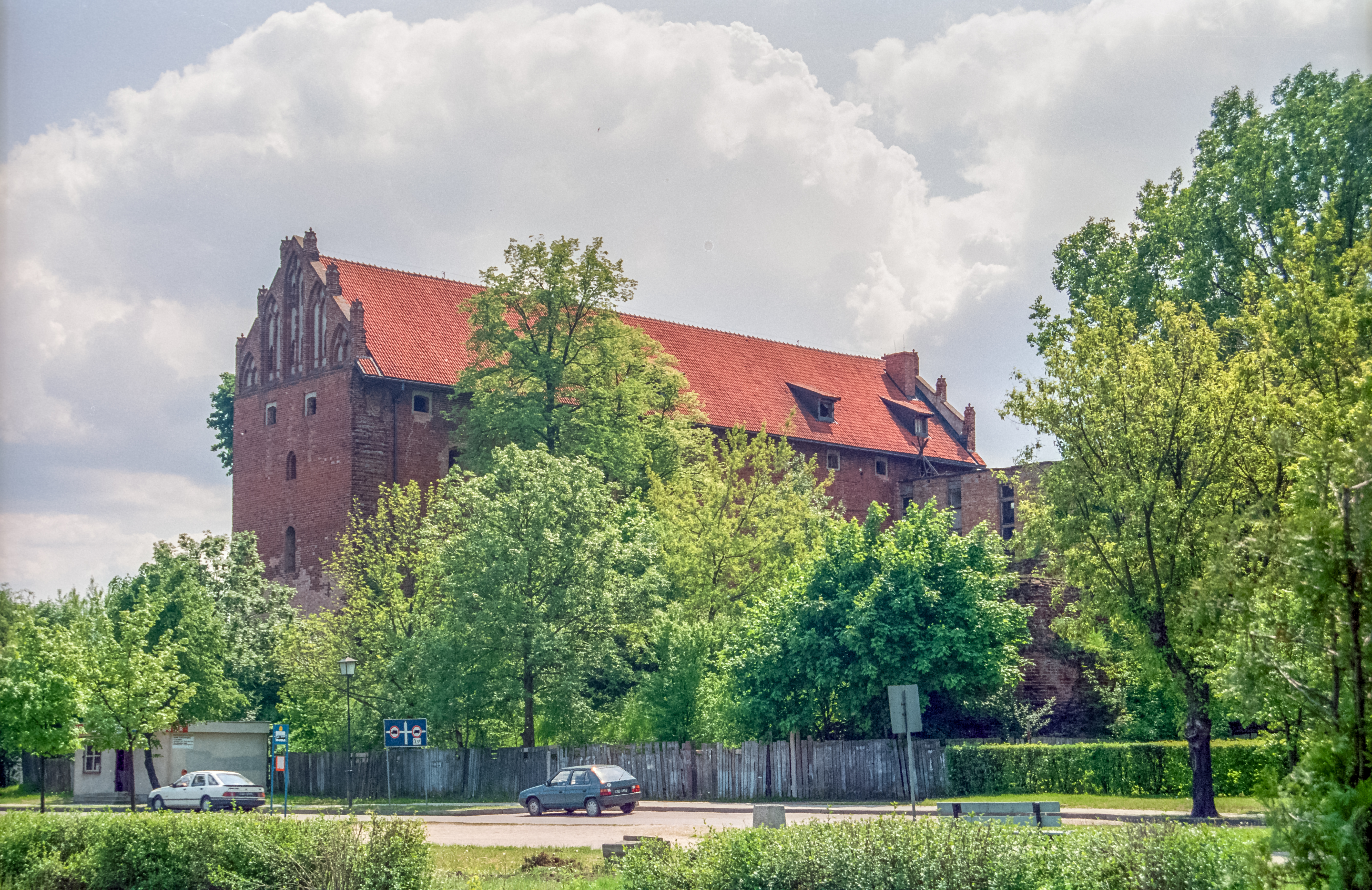 Działdowo - zamek pokrzyżacki z przedzamczem, 1340, 1676, 1794